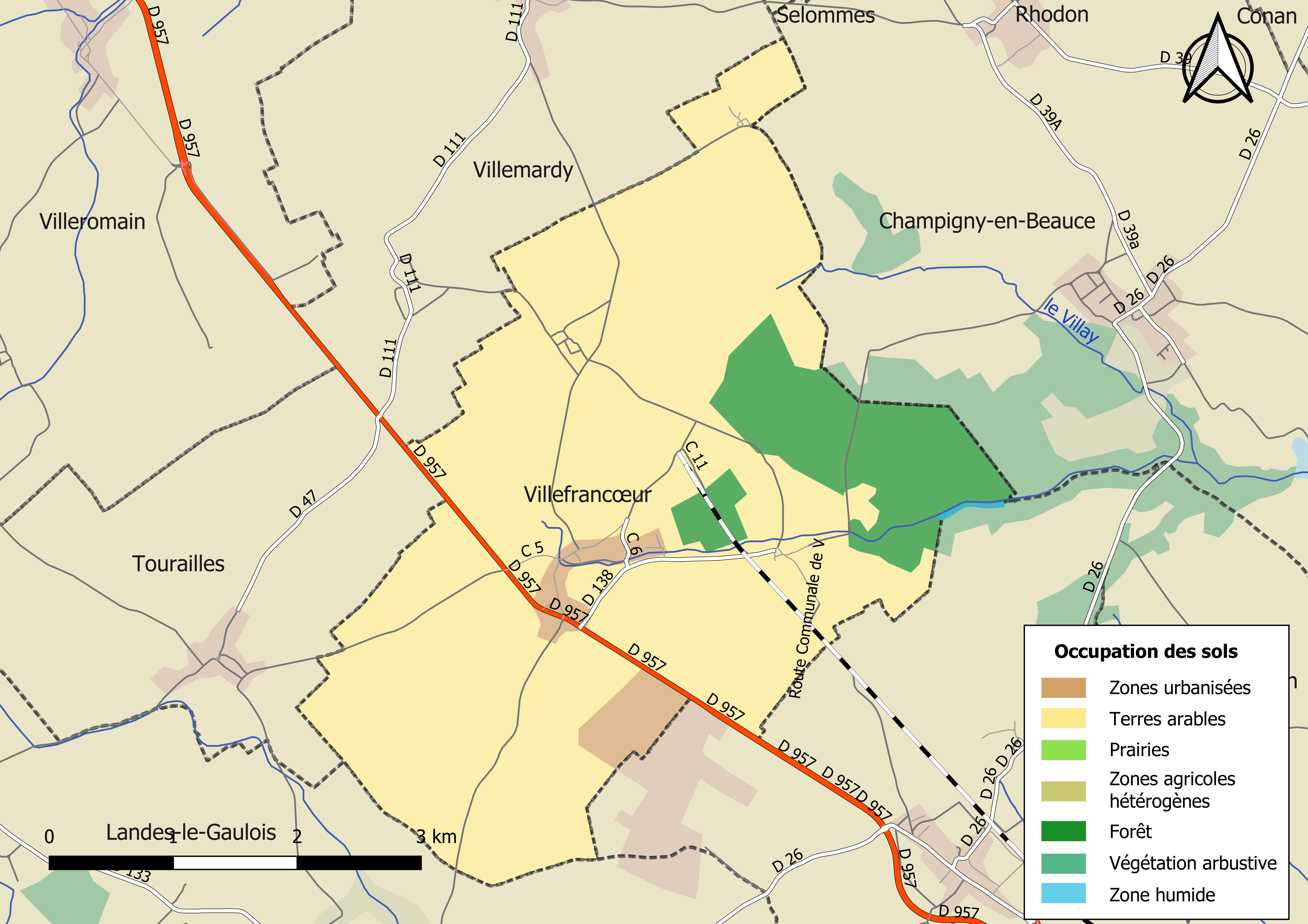 Carte des infrastructures et de l’occupation des sols en 2018 de la commune de Villefrancœur (France).